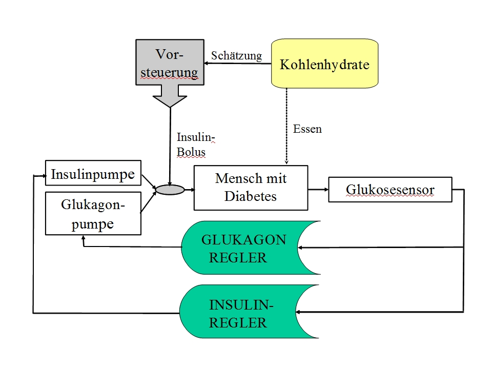 Regler für bihormonales künstliches Pankreas